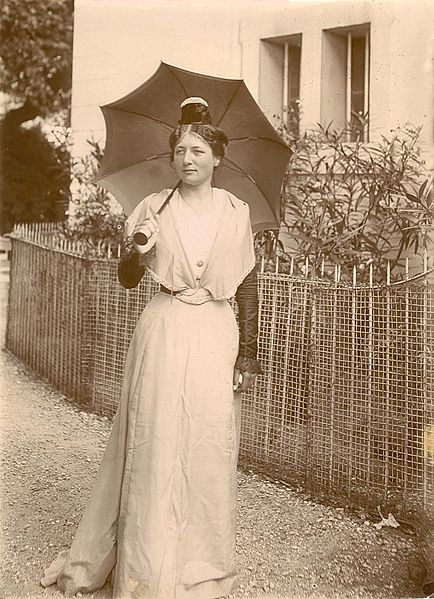 Melle Fanfonne à Praviel vers 1913 (Col. Robert Faure)